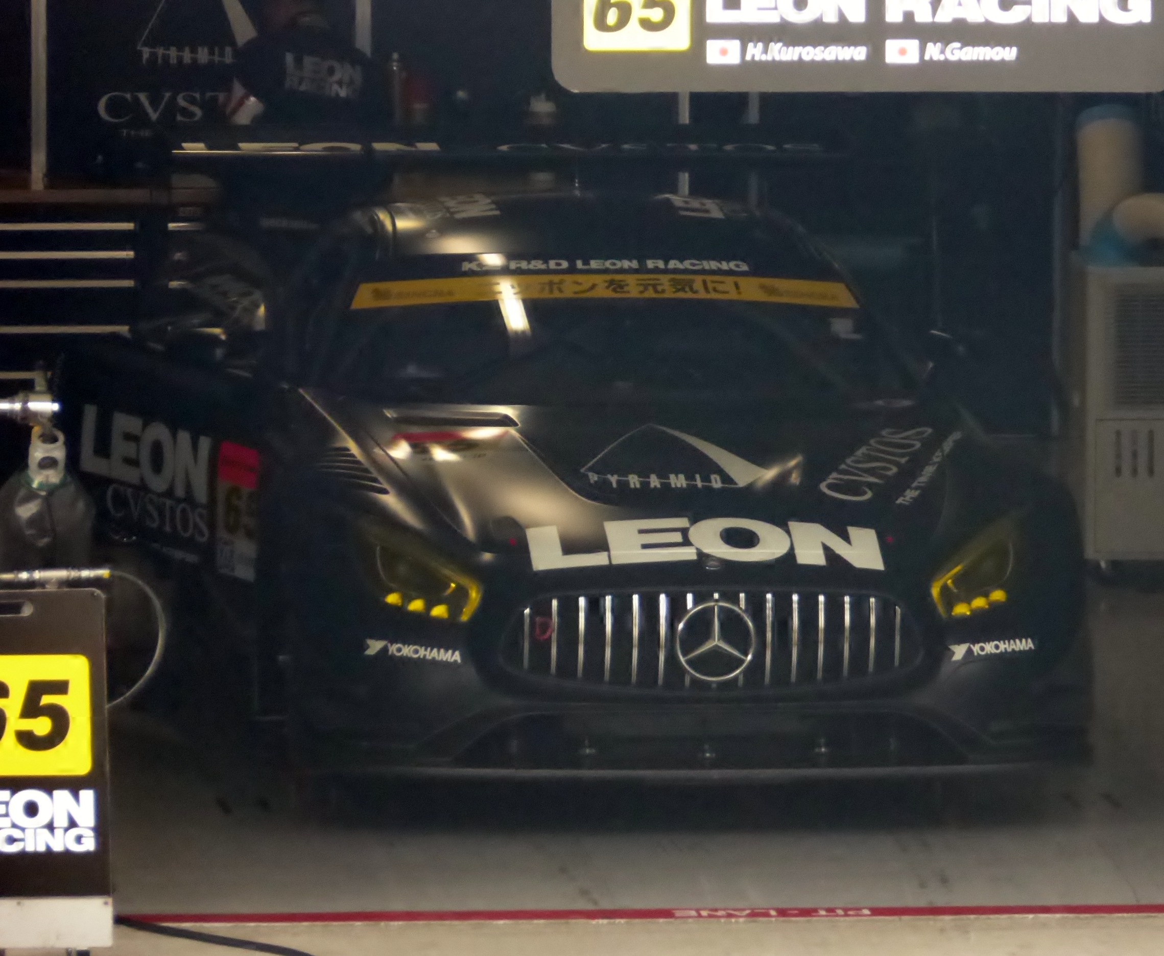 2016年鈴鹿1000㎞における65号車LEON CVSTOS AMG-GTを撮影。